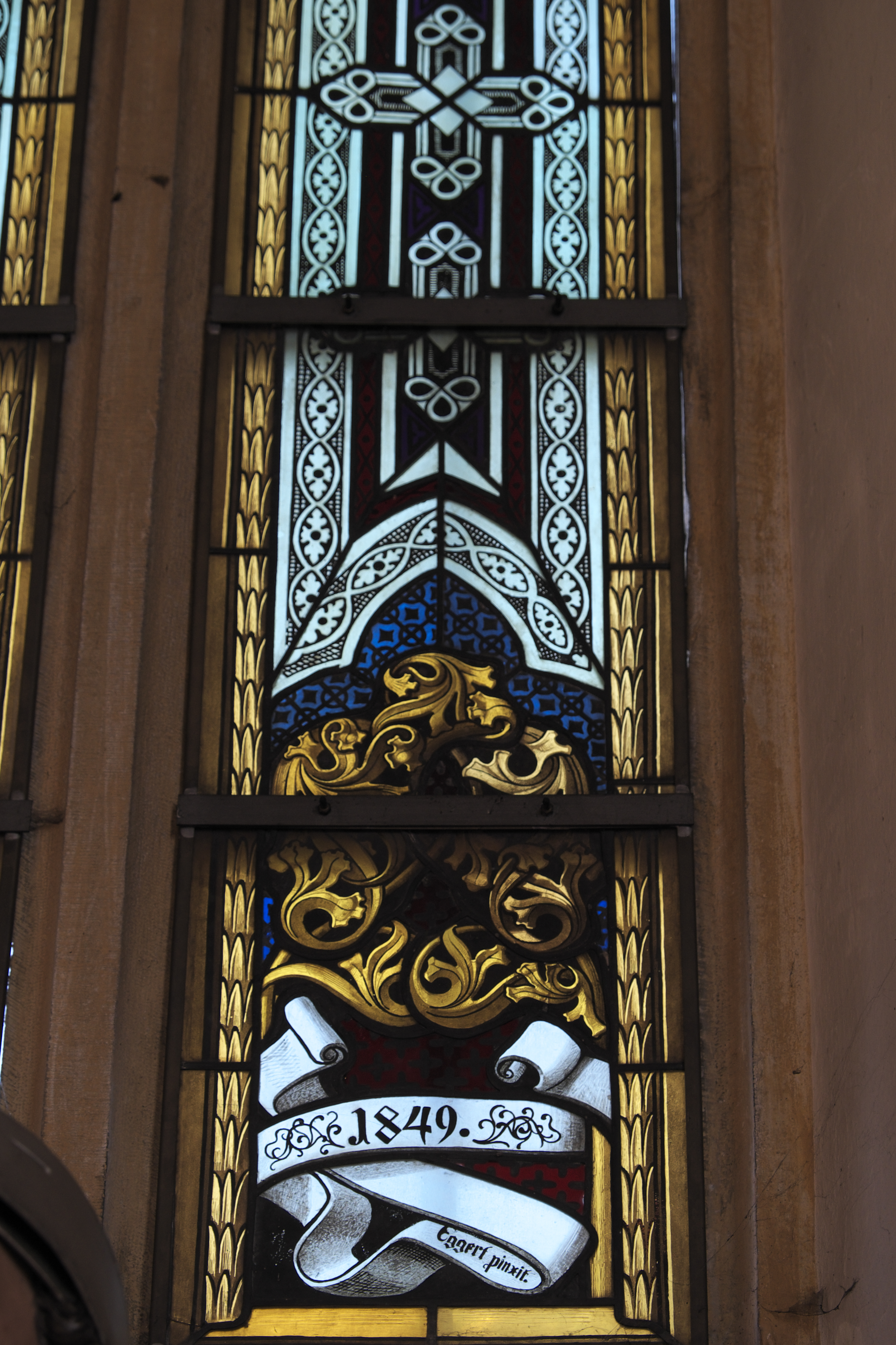 Katholische Friedhofskirche St. Salvator in Höchstädt im Landkreis Dillingen an der Donau (Bayern), Bleiglasfenster von Franz Xaver Eggert, mit Signatur Eggert pinxit und der Jahreszahl 1849 (Ausschnitt)